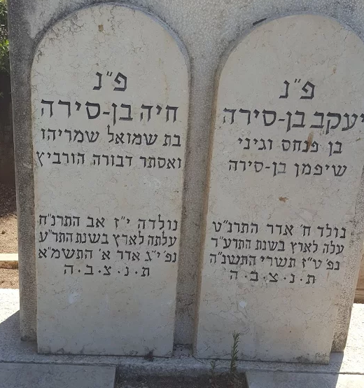 קבר יעקב בן סירה בבית העלמין בנחלת יצחק